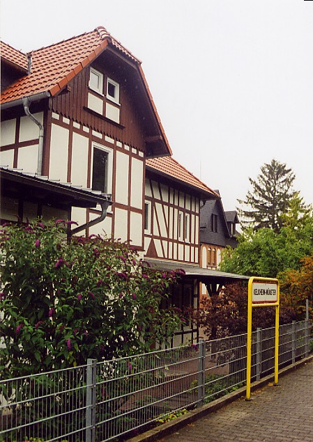 Kelkheim Münster Bahnhofsgebäude